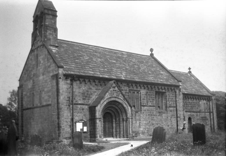 Adel Church Motiv: Adel Church Kategori: (01) Exteriörer Adel Church.